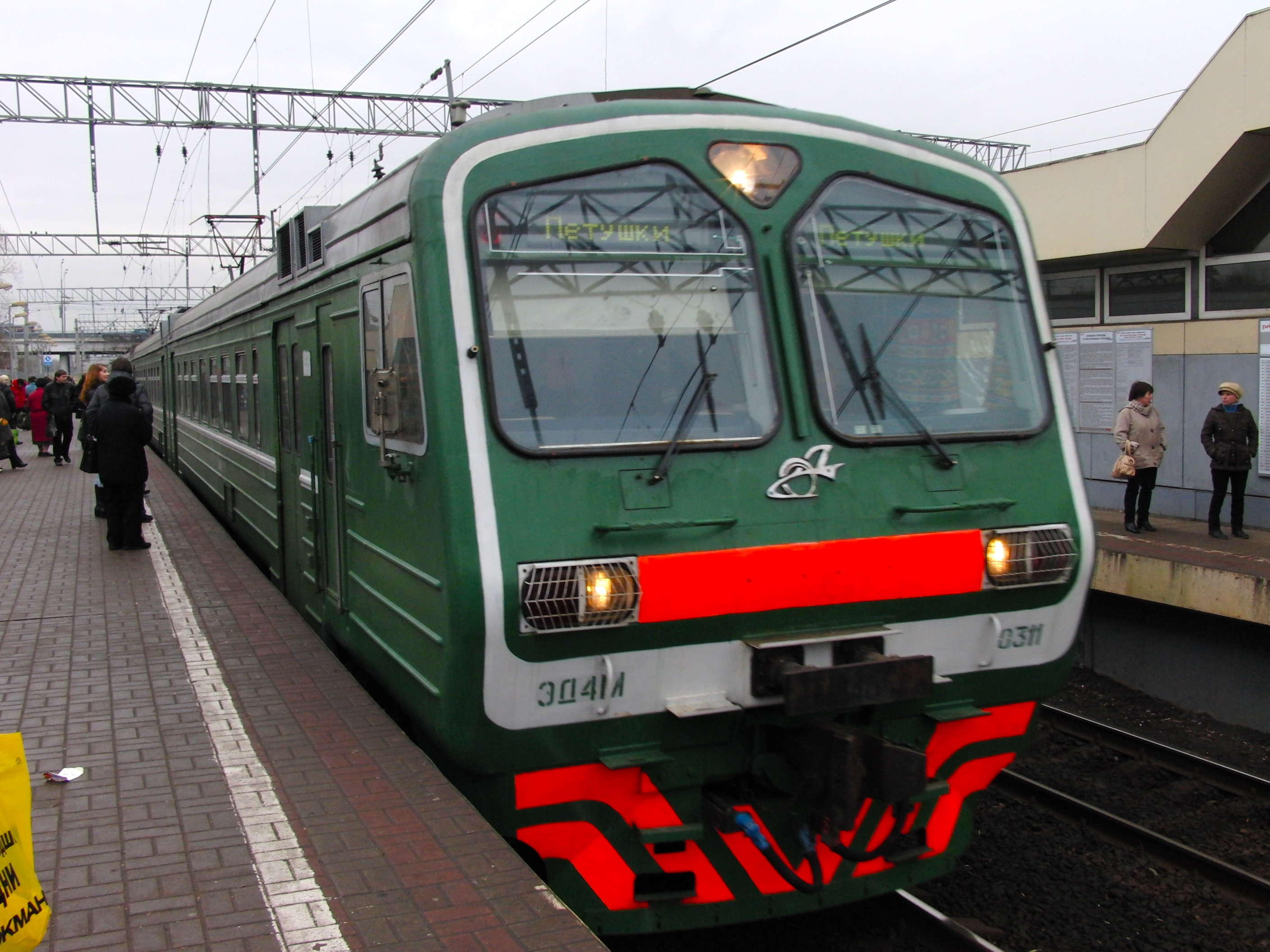 Novogireevo train station, ED4M local train to Petushki (Станция Новогиреево, электропоезд ЭД4М в Петушки)